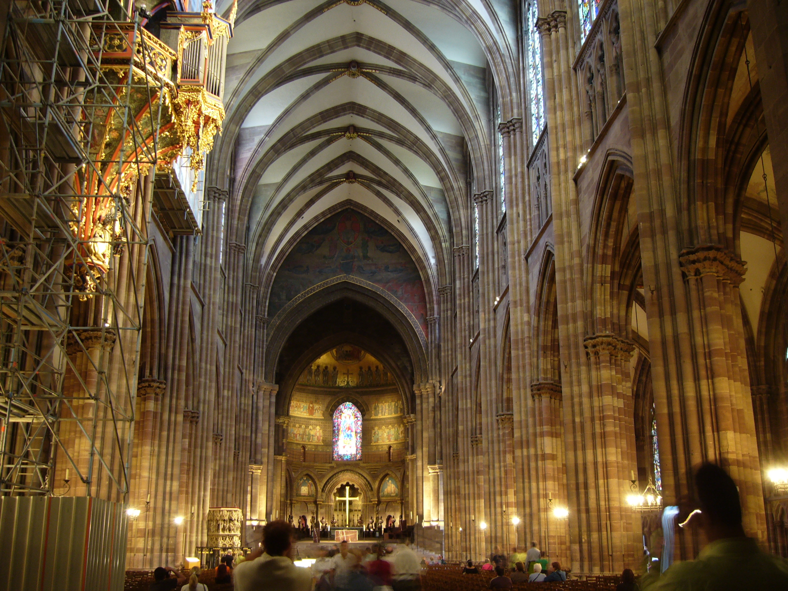 Cathédrale de Strasbourg (vue intérieure)